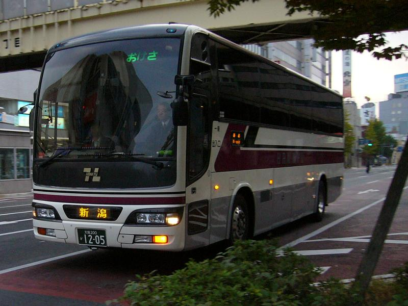 登録番号 大阪200か12-05 阪急バス所属 車番2853 夜行バス用 （各系統で共通運用） 2005年11月6日 新潟万代シティバスセンター附近にて撮影